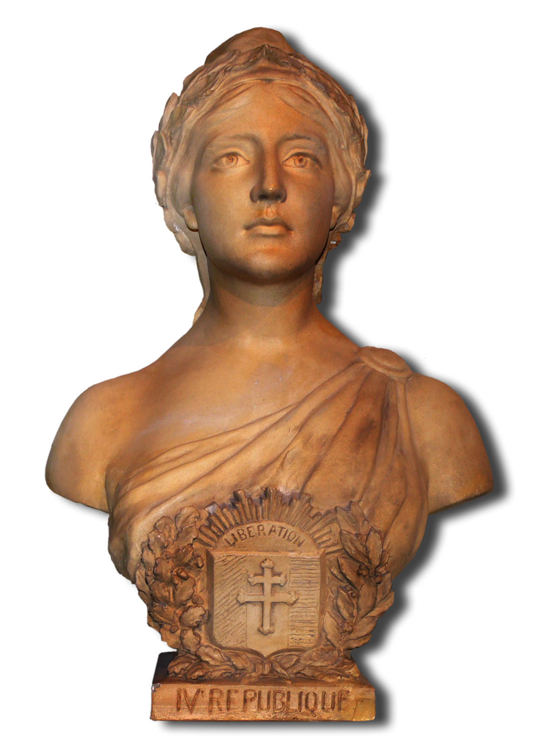 Buste ancien de Marianne, sculpté par M. Leduc. Marianne est un des symbole de la république française. ce buste est exposé dans les couloirs du Sénat à Paris. Photo de F. Lamiot (own Work) faite le 15 novembre 2006